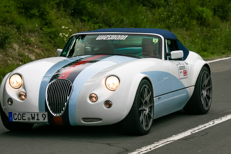 1000 miglia 2012 - SS della Futa . Pianoro (BO)